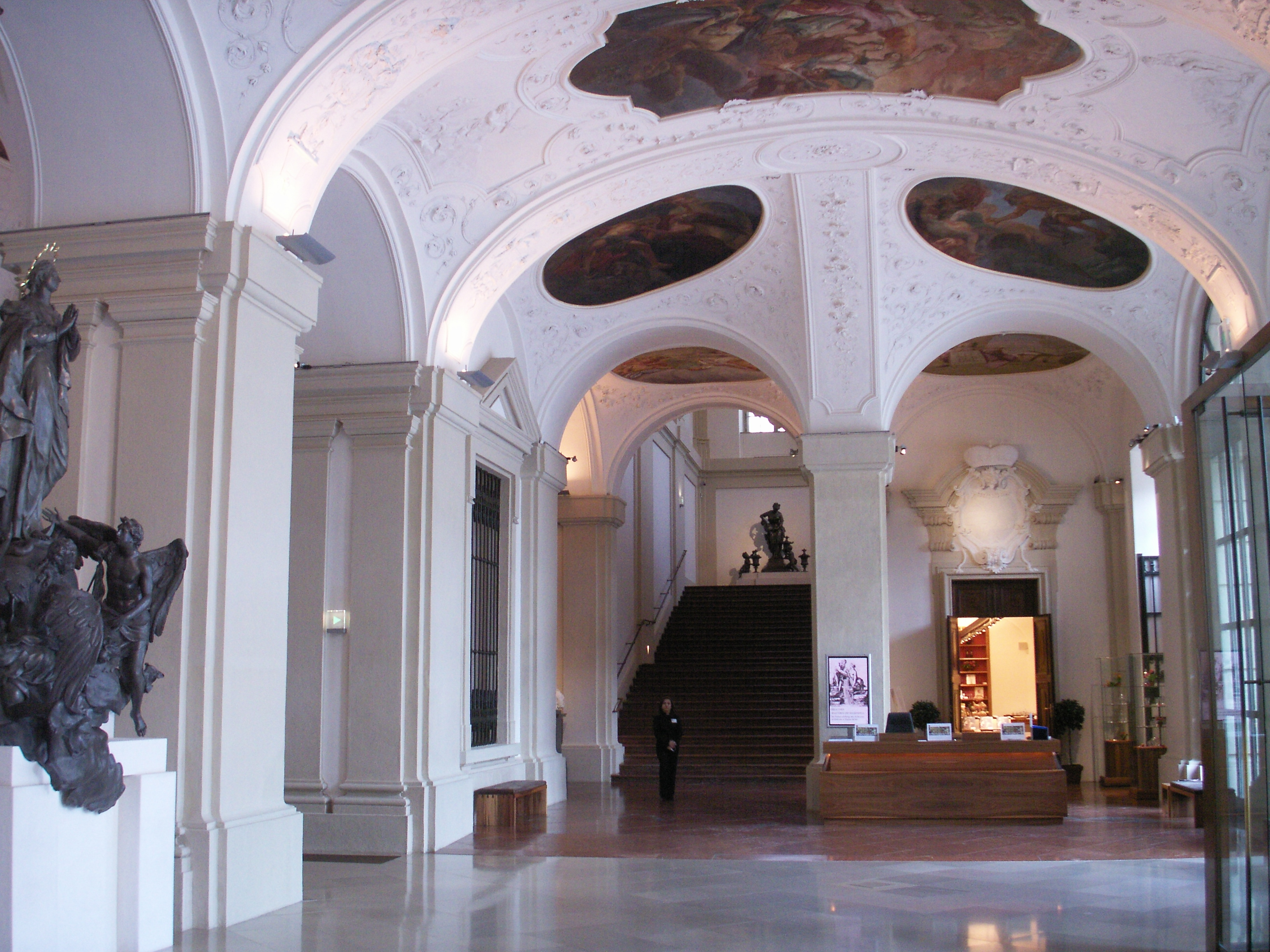 Die Sala Terrena ist das Entrée des Gartenpalais Liechtenstein und war nach der Art italienischer Palastbauten als offene Halle konzipiert. Vom Ehrenhof des Palais gelangte der Besucher noch bis Ende des 19. Jahrhunderts direkt in den Garten im Norden, allein Gitter schlossen den Raum ab. Die Fresken in den Deckenspiegeln sind Werke des Johann Michael Rottmayr (1654–1730) und zeigen untere anderem die vier Elemente und die fünf Sinne. Links: Franz Xaver Messerschmidt. Maria Immaculata, 1766 Blei-Zinn-Legierung Höhe 300 cm Inv.-Nr. SK1479 Provenienz: Beauftragt beim Künstler durch Maria Felicitas von Savoyen-Carignan für die Fassade des Savoyenschen Damenstiftes, Johannesgasse 15–17, Wien